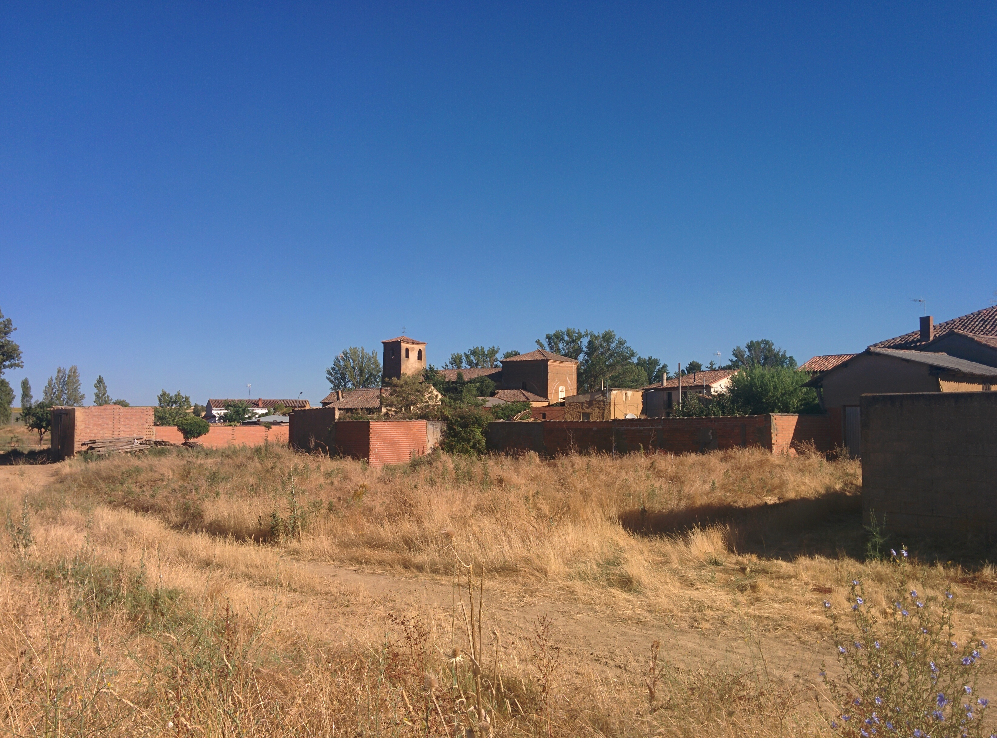 Vista de Villelga (Palencia, España).